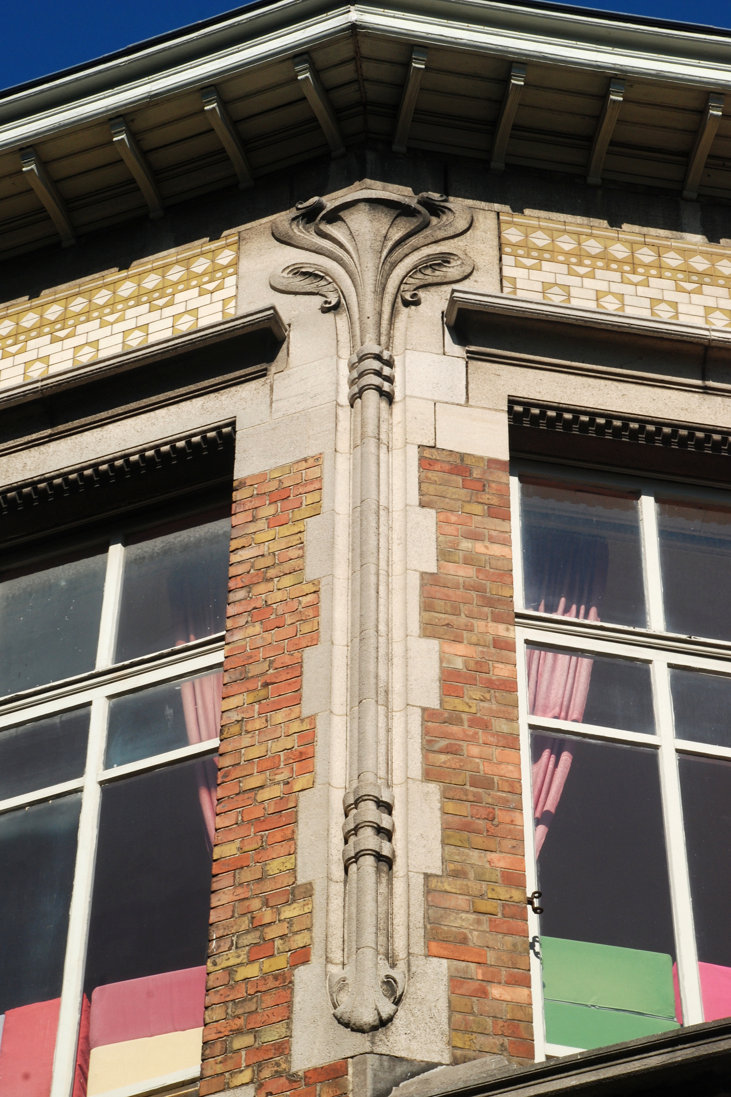 Belgique - Bruxelles - Centre scolaire du Souverain